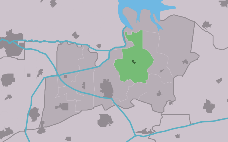 Kaartsje fan himrik fan Kollumerpomp